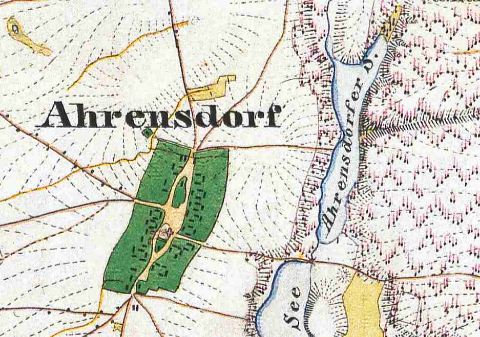 Ahrensdorf, Ortsteil der Gemeinde Rietz-Neuendorf, Lkr. Oder-Spree, Brandenburg, Deutschland, Ausschnitt aus dem Urmesstischblatt 3850 Kossenblatt von 1846